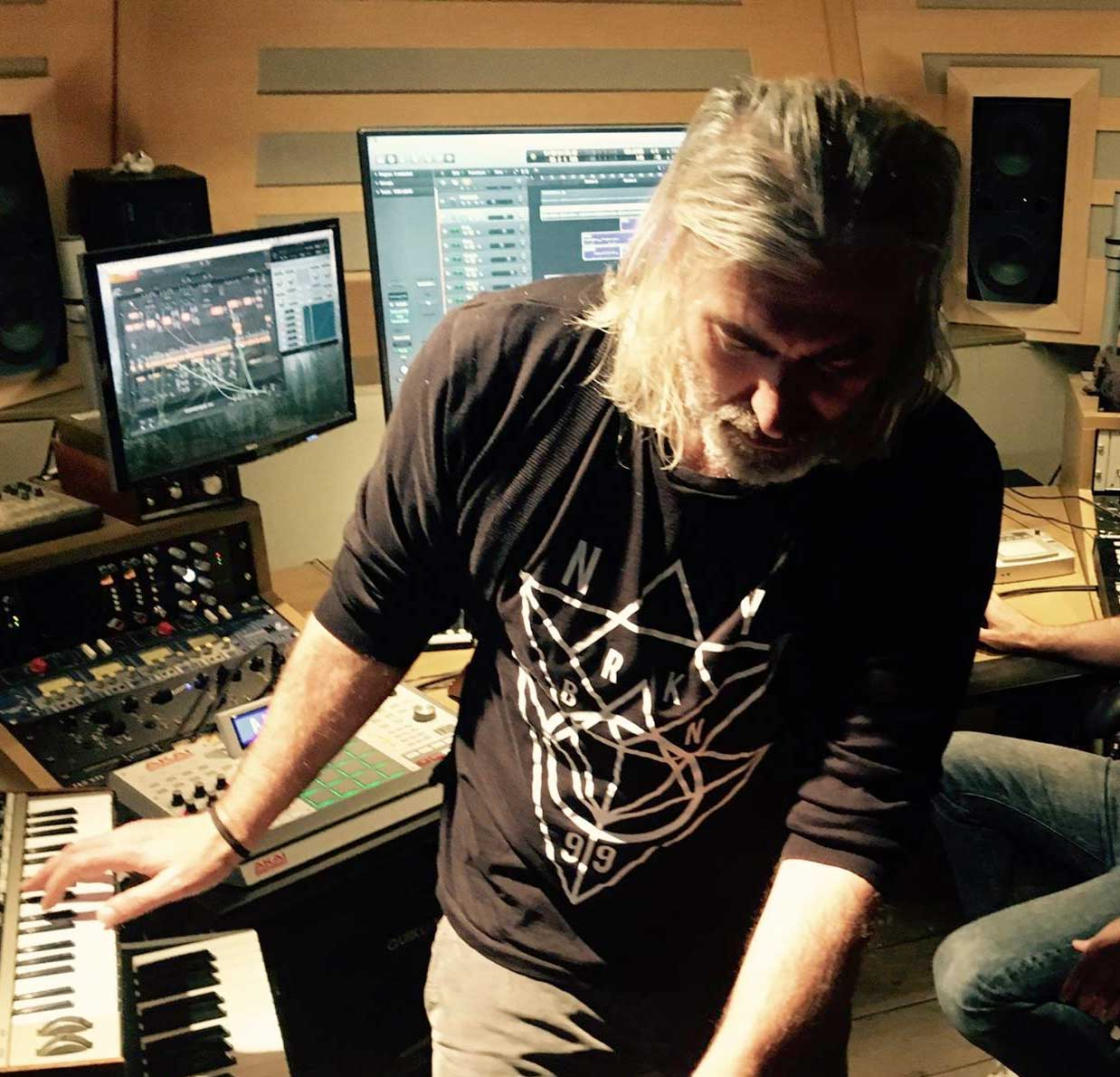 musicista e produttore discografico